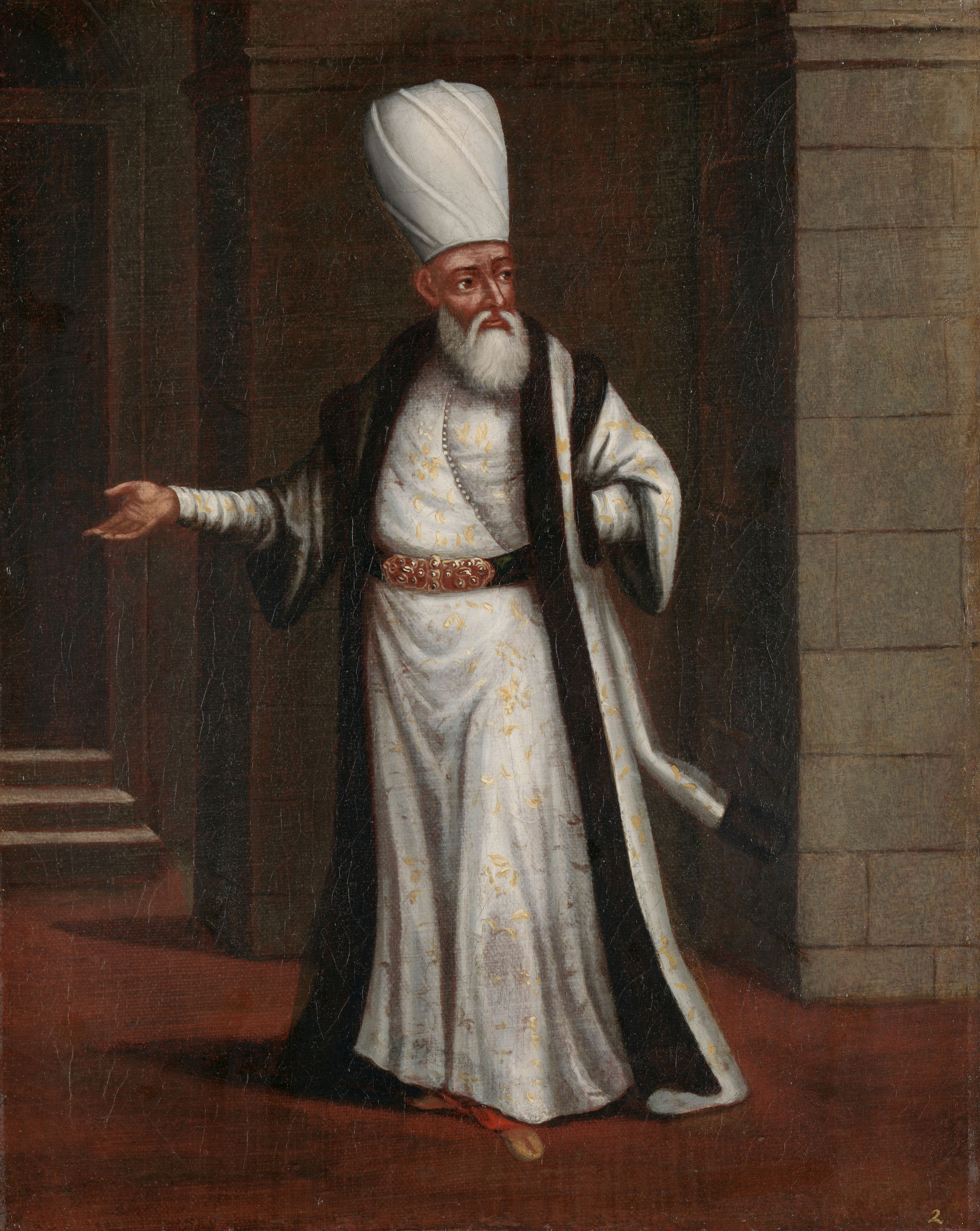 Aga, de opperbevelhebber der Janitsaren. Staande, ten voeten uit, met een hoge tulband. Collection: schilderijen; Vanmour serie